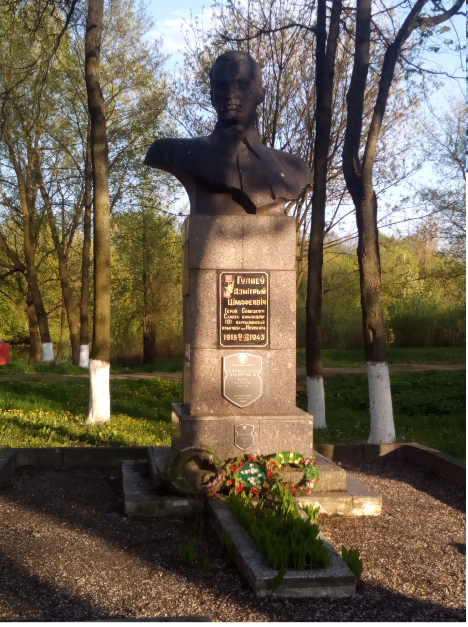 Беларуская (тарашкевіца): Помнік партызану Вялікай Айчыннай вайны Дзьмітрыю Цімафеевічу Гуляеву ў мястэчку Старобін